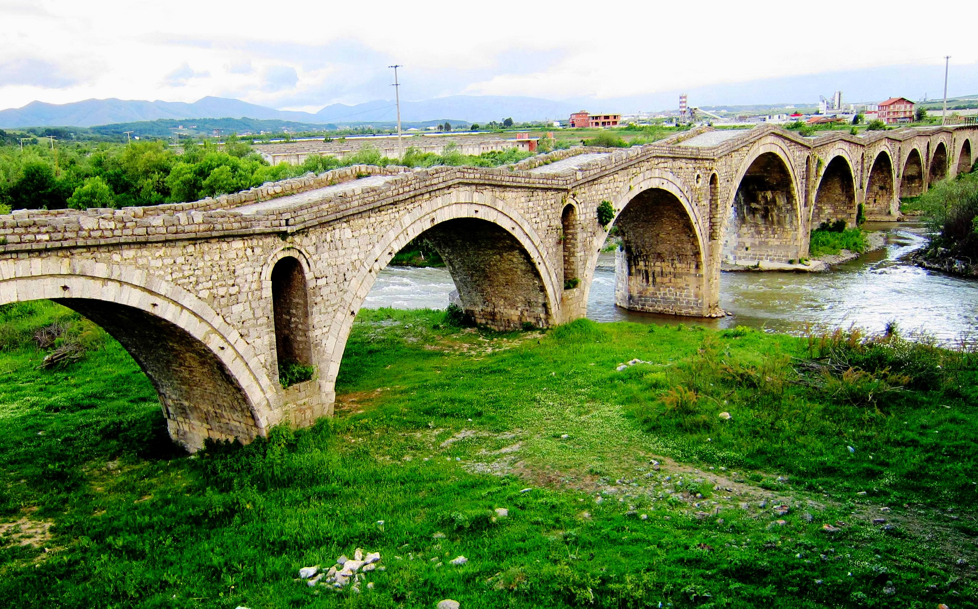 Die Schneiderbrücke (Ura e Terzive) über den Fluss Erenik, Kosovo